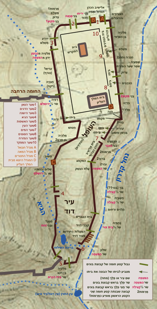 בוני החומה בהנהגת נחמיה כמפורט בספר נחמיה פרק ג. נערך על ידי אלון אדיר, לרוב בעקבות ההשערות המובאות באנציקלופדית עולם-התנך - כרך דניאל, עזרא ונחמיה. סימוני החומה ובוניה אוירו על פני מפה טופוגרפית של ירושלים שנתרמה על ידי אוסף ערן לאור, הספריה הלאומית.